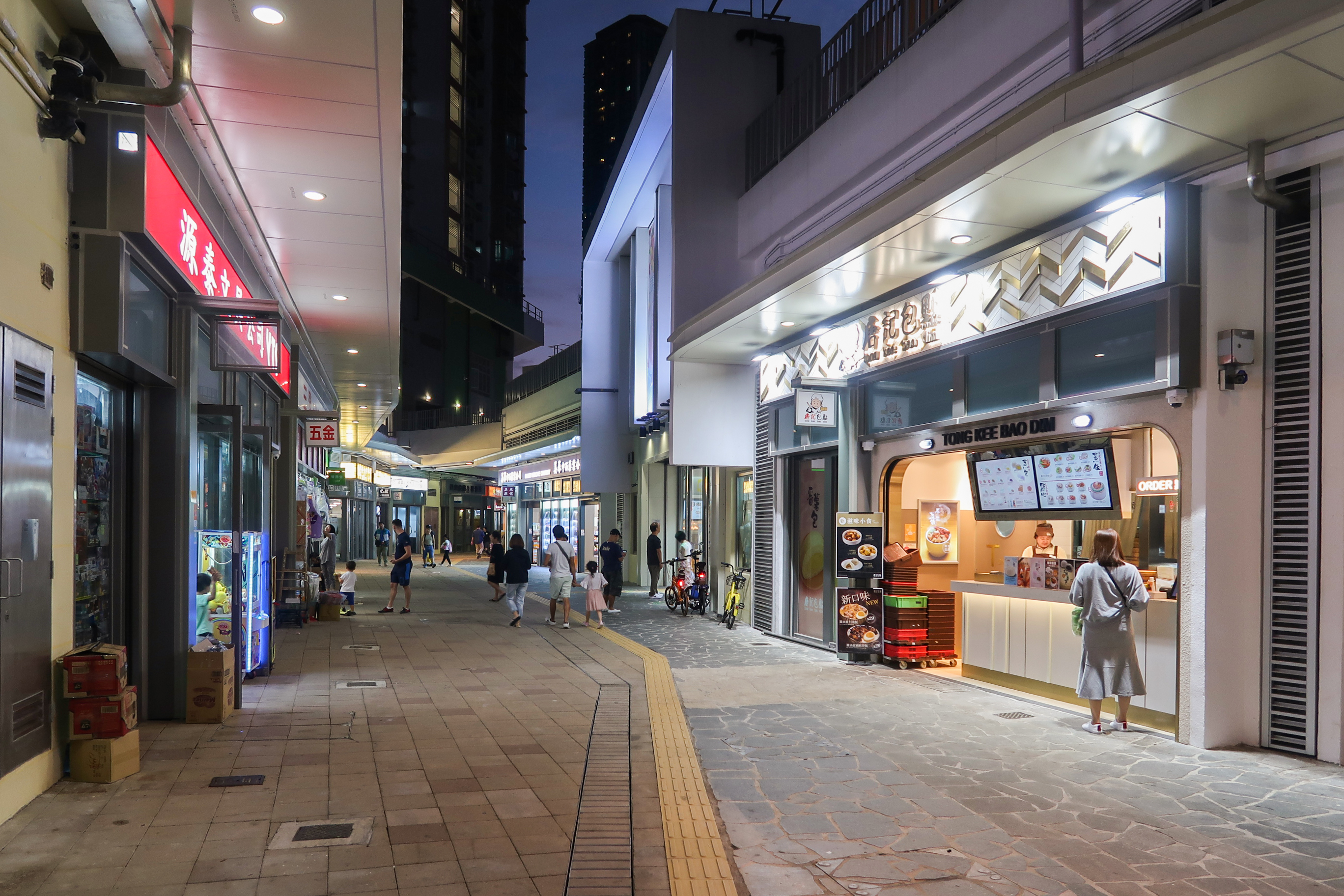 Ying Tung Estate Shopping Centre